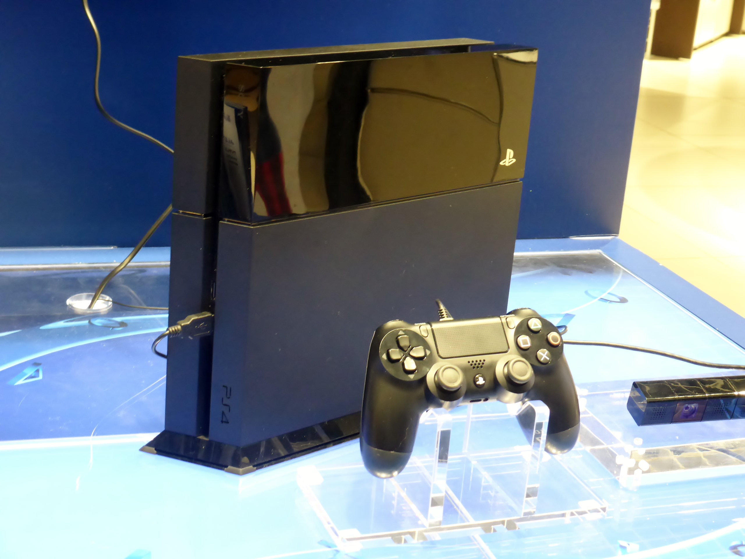 プレイステーション4の筐体とコントローラーを撮影。